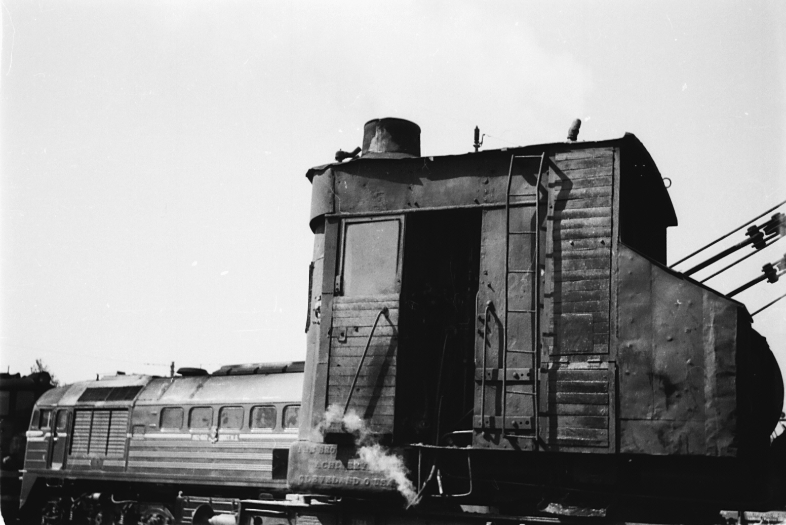 Этот паровой грейфер на железнодорожном ходу работал в 1970-е - начале 1980-х годов (и ранее) в локомотивном депо станции Уссурийск. Сделан в США, вероятно получен по ленд-лизу. Когда были паровозы - он загружал уголь в паровозные тендеры, затем использовался как подъемный кран.